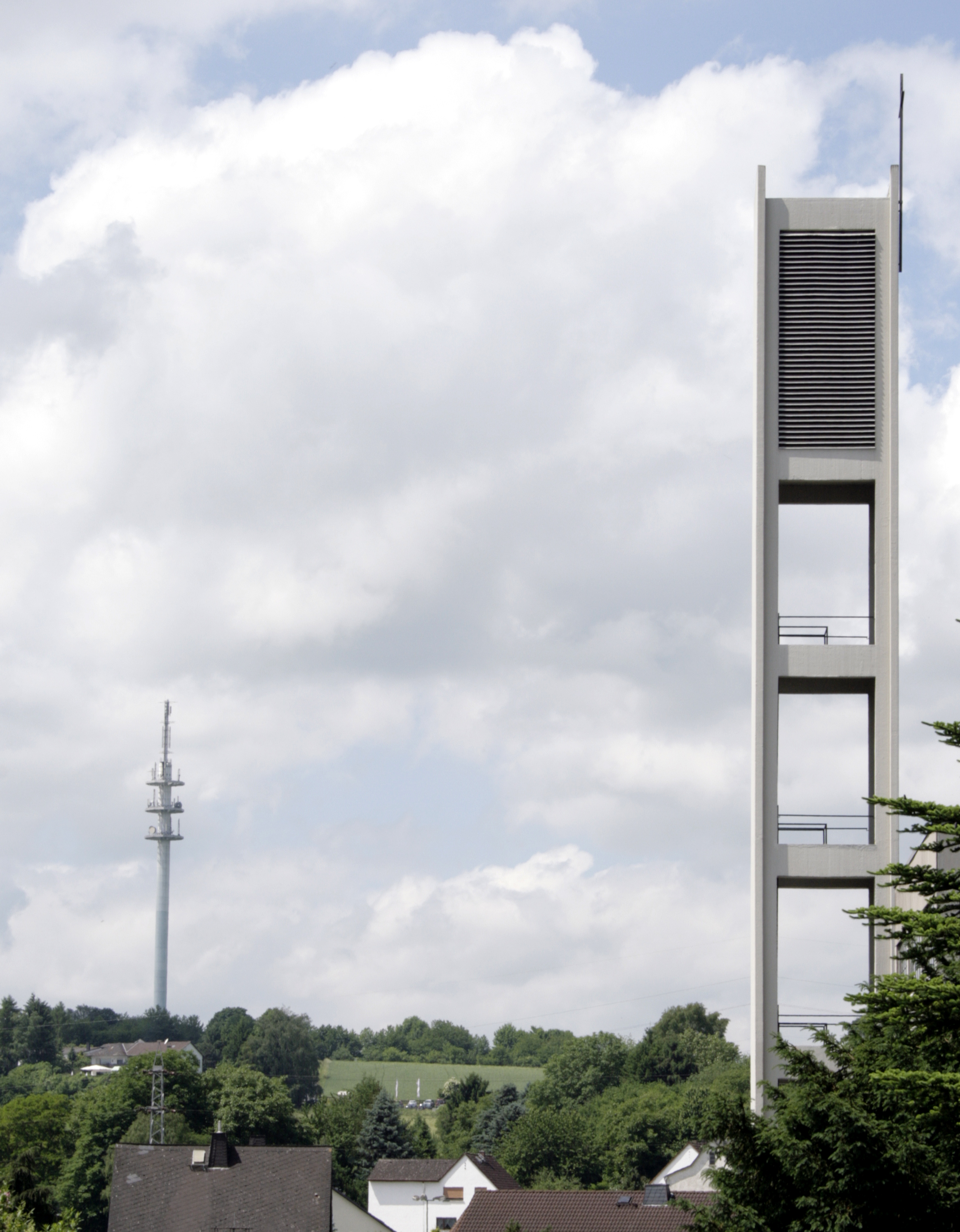 Turm der katholischen Kirche (rechts) und Fernsehturm westlich von Limburg-Staffel, Deutschland